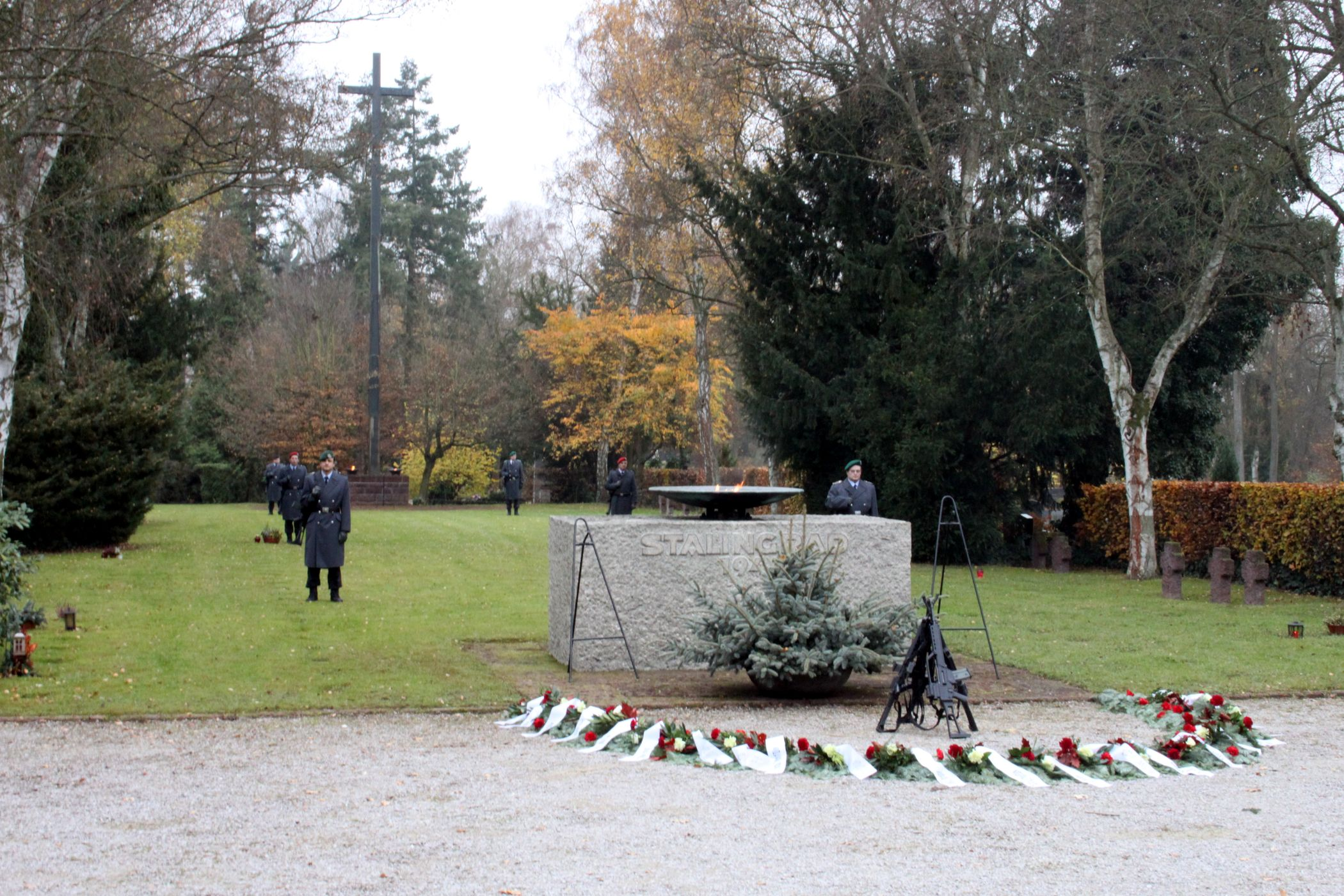 Soldaten der Bundeswehr sind integraler Bestandteil der Zeremonie zum Gedenken an die Gefallenen der Schlacht von Stalingrad. Jährlich finden in Limburg am zentralen Platz für die Gefallenen Soldaten von Stalingrad am Volkstrauertag Ansprachen und Kranzniederlegungen statt.